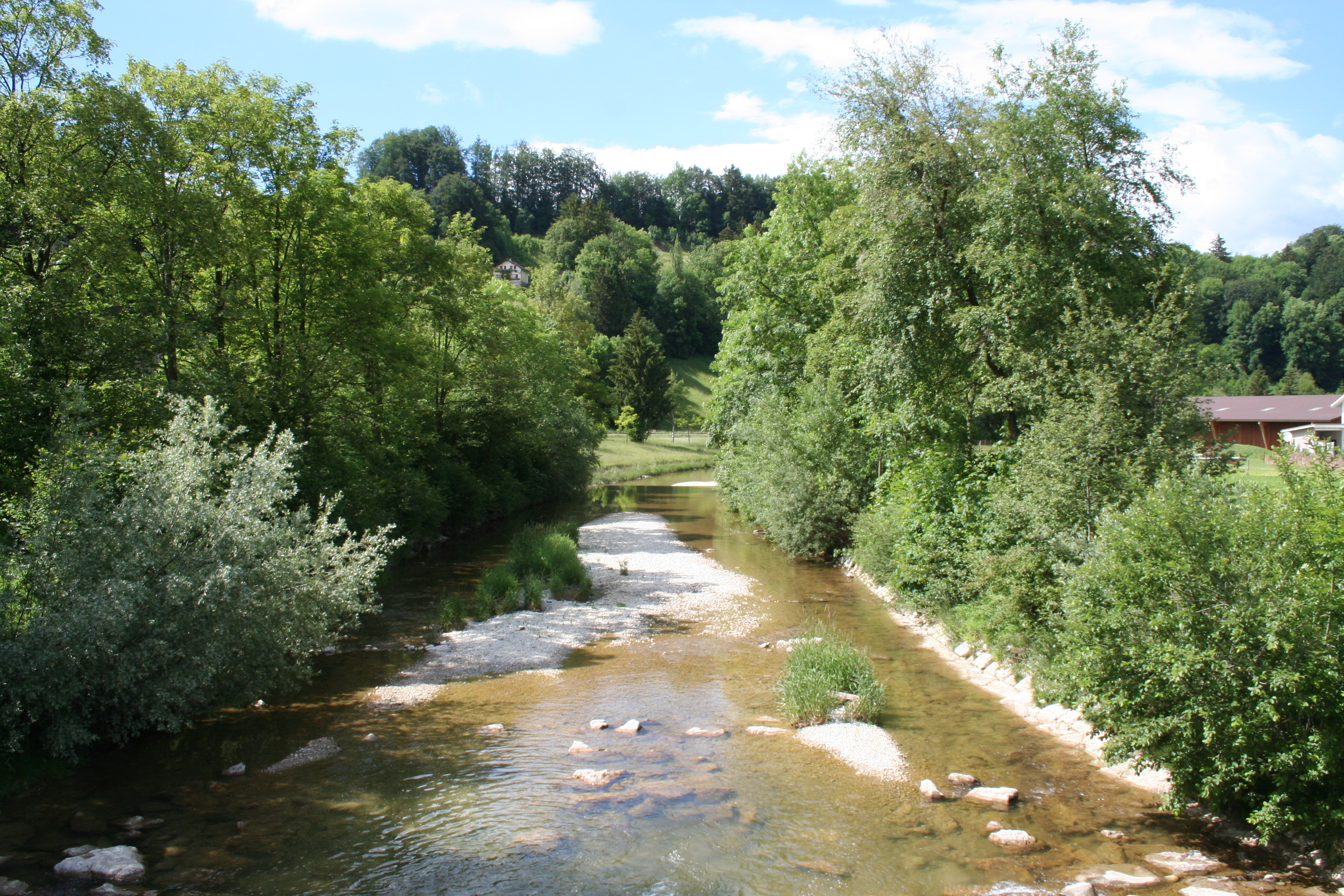 Töss (Fluss) bei Bauma